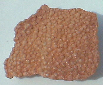 Fragments d'œufs de Hypselosaurus